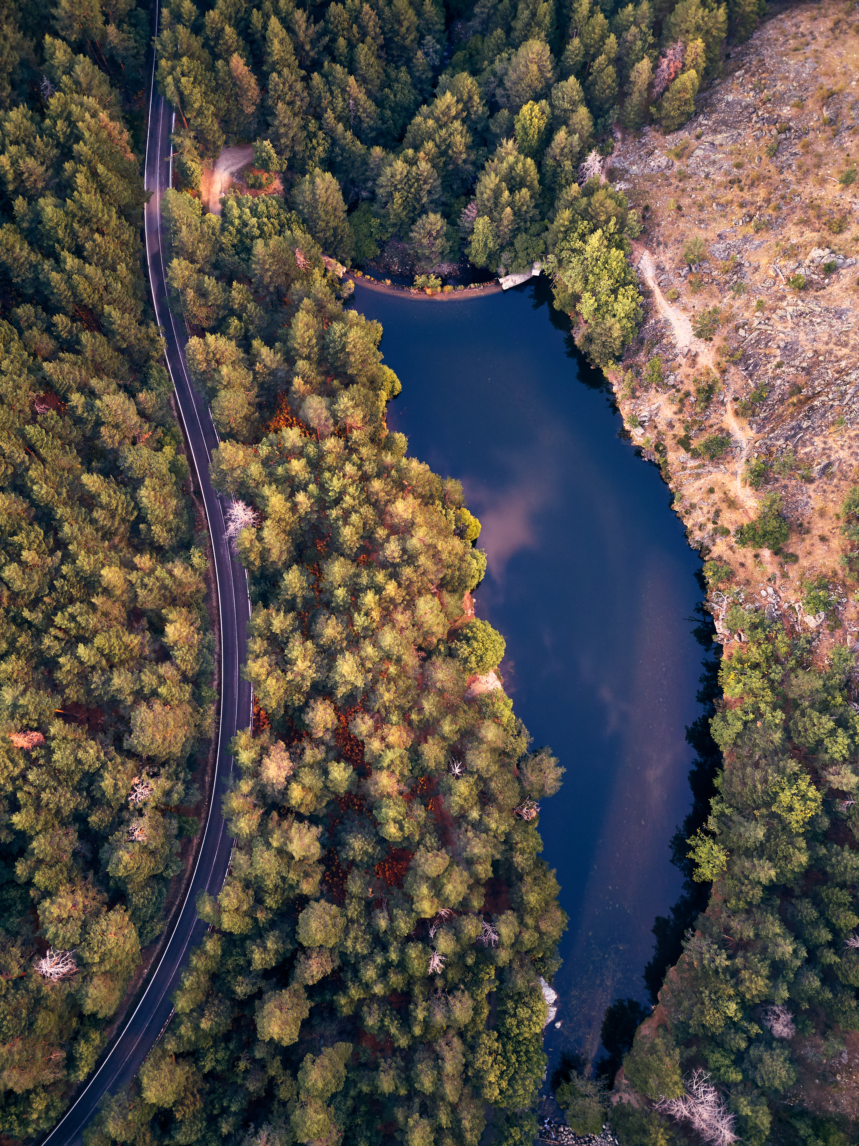 Presa Del Pradillo